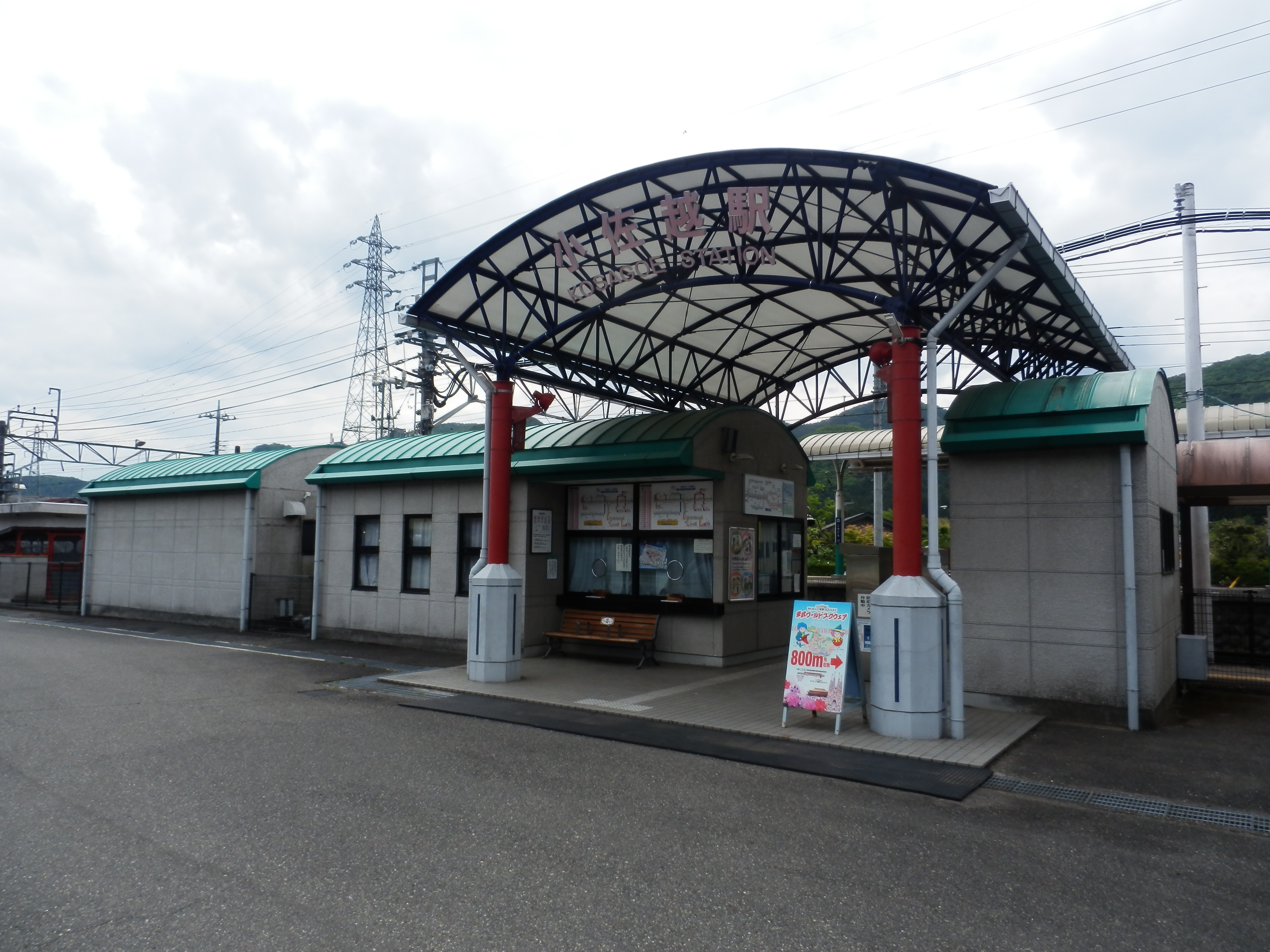 小佐越駅駅舎